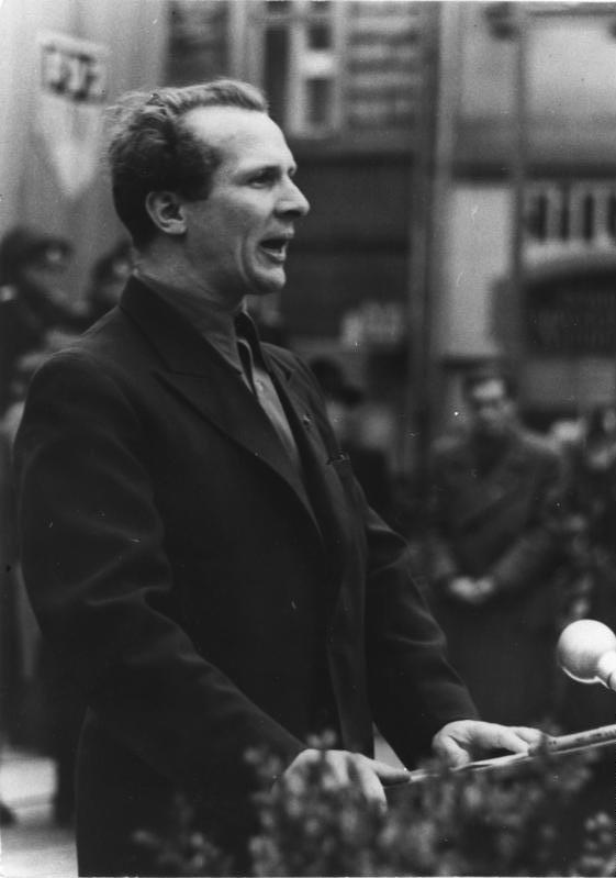 Zittau, Jugend-Dreiländertreffen, Erich Honecker ADN-ZB/Quatschinsky/12.11.1950 Erich Honecker, Vorsitzender des Zentralrates der FDJ, spricht auf dem Dreiländertreffen in Zittau, an dem die FDJ, die Jugendverbände der VR Polen (ZMP) und der Tschechoslowakei (CSM) beteiligt waren. [Zittau.- Erich Honecker am Rednerpult (Porträt)] Abgebildete Personen: Honecker, Erich: Staatsratsvorsitzender, Generalsekretär des ZK der SED, DDR (GND 118553399)